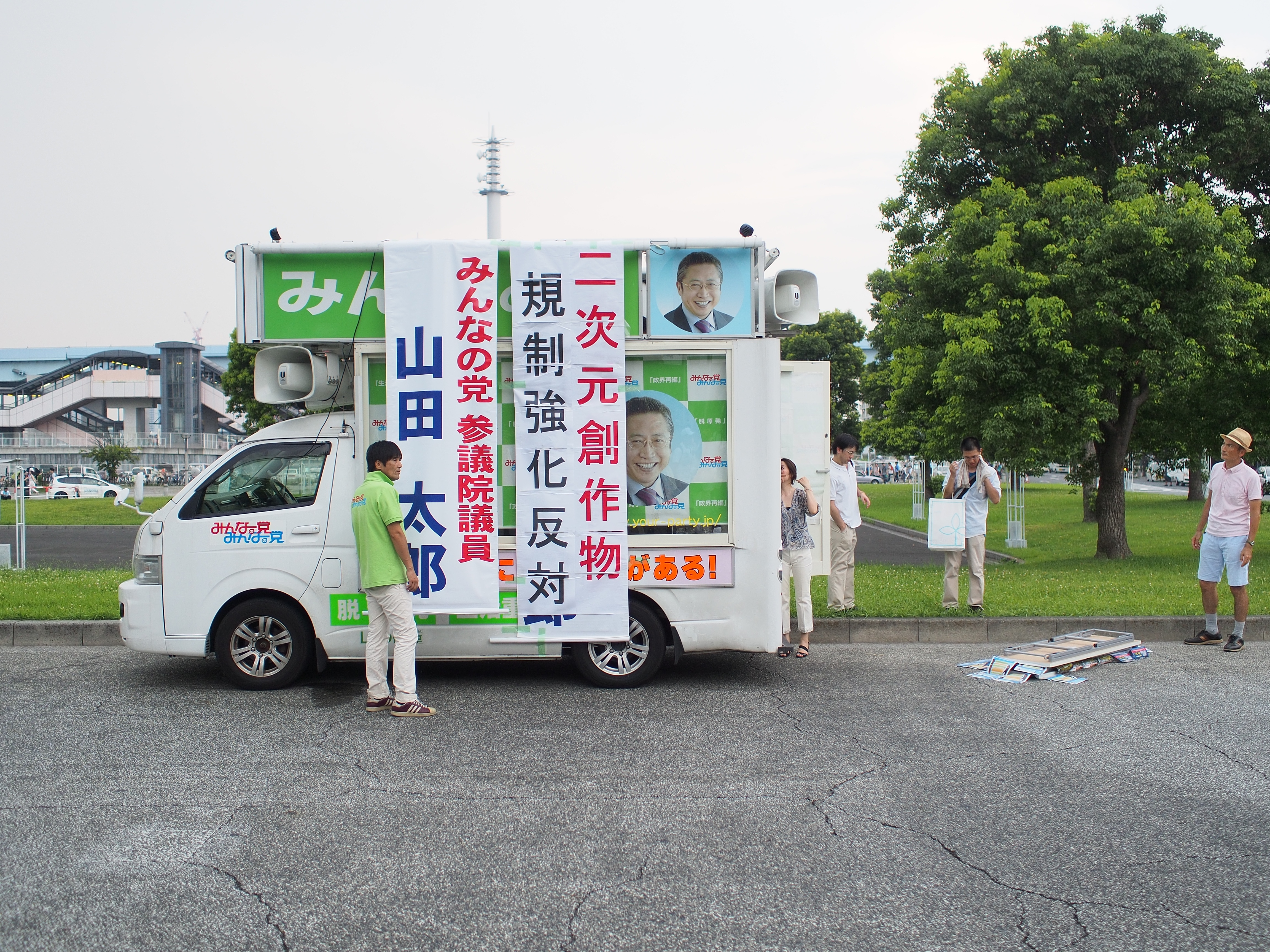 Comic Market 84，眾人之黨參議院議員山田太郎街宣車。